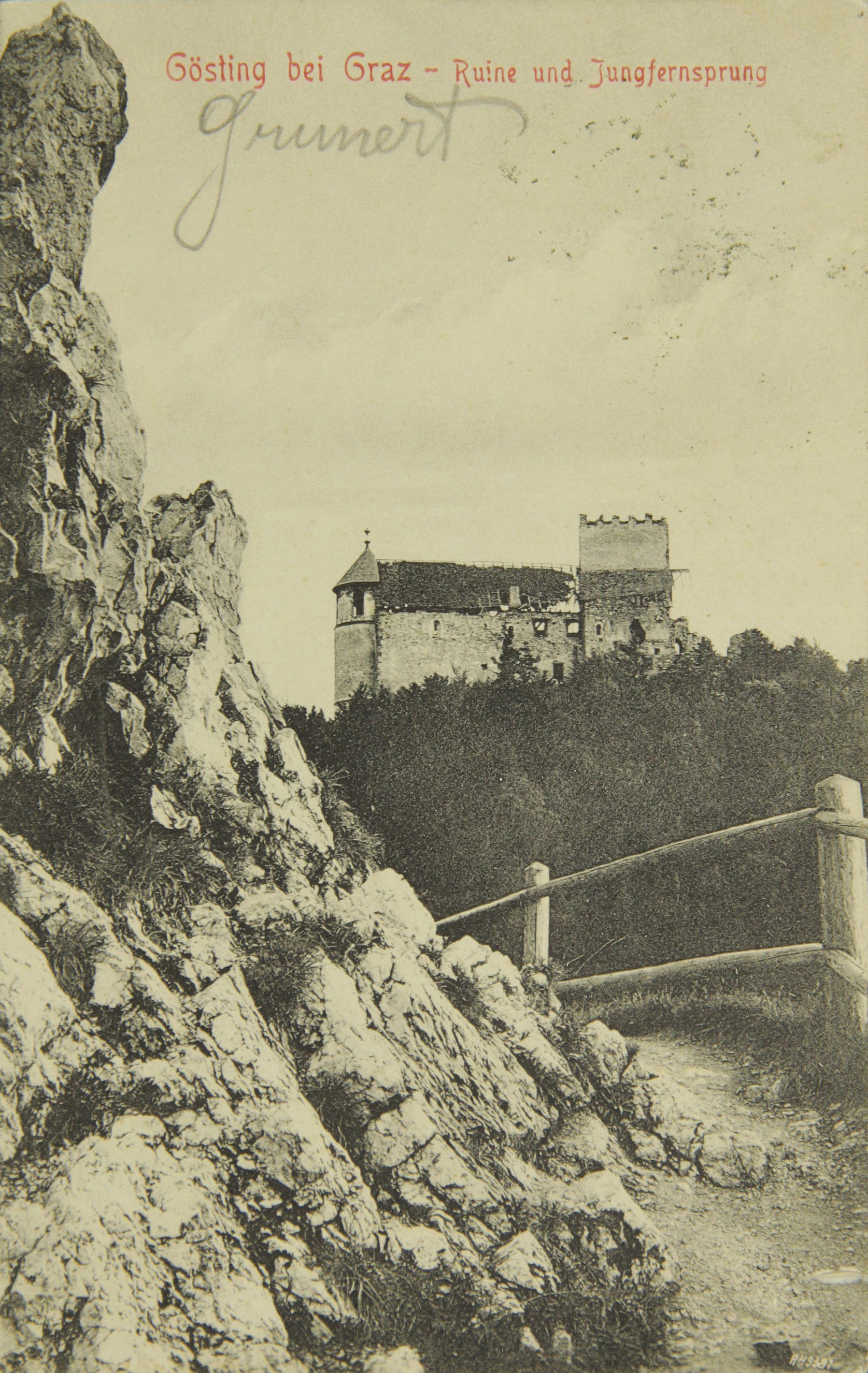 Gösting bei Graz - Ruine und Jungfernsprung (1908)